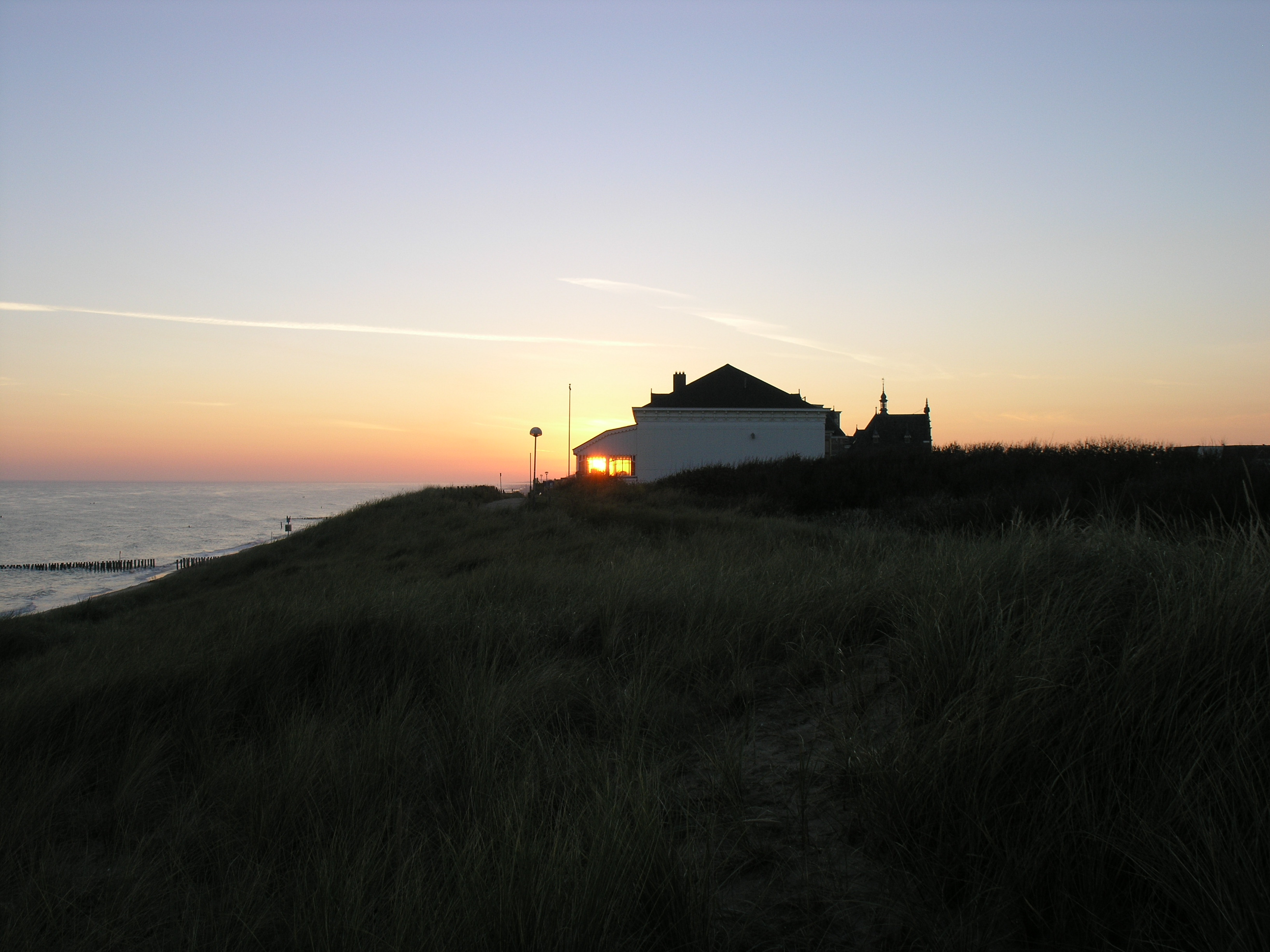 Domburg Zonsopgang